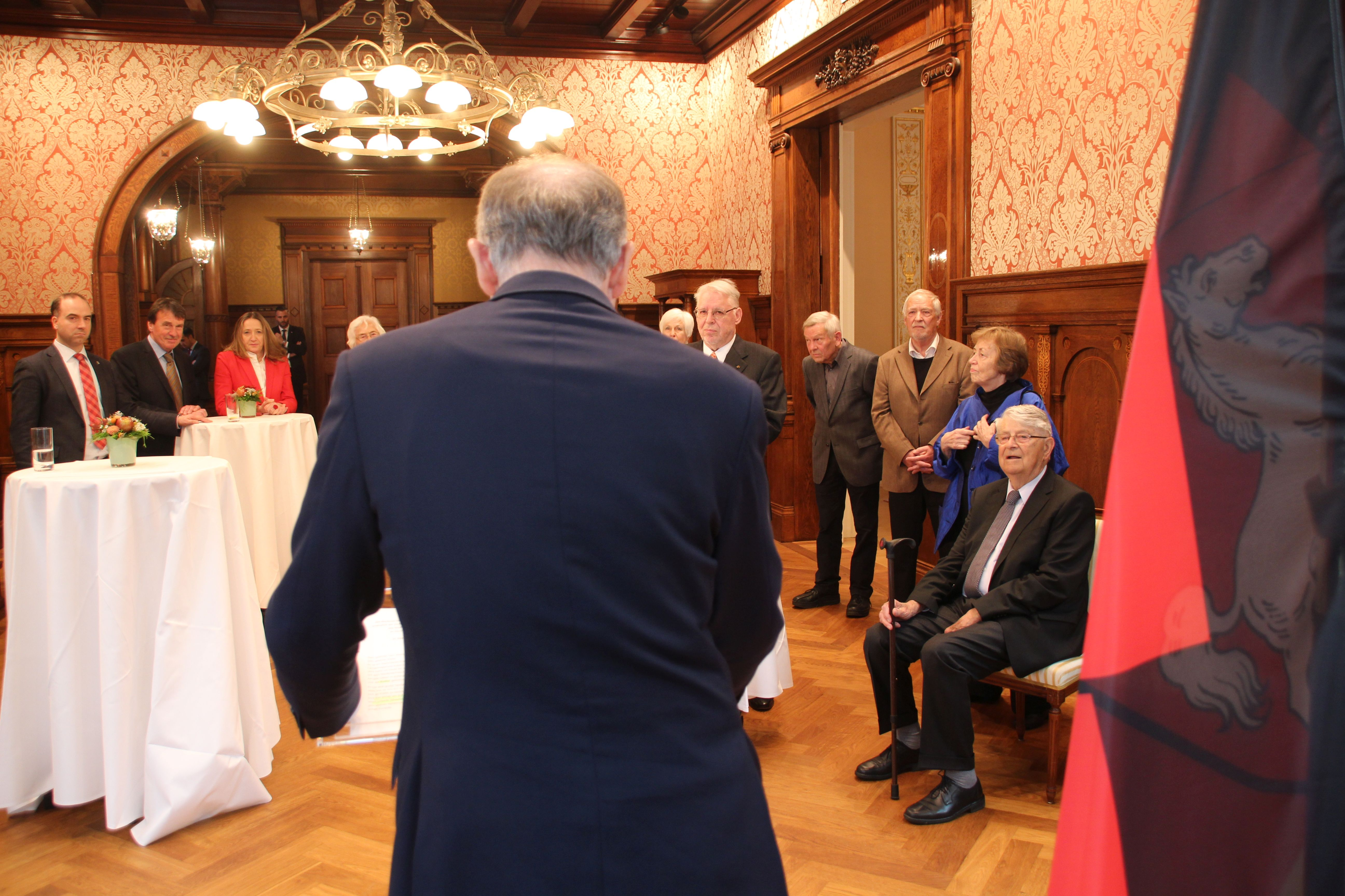 Stephan Weil, Niedersachsens Ministerpräsident, verlieh Klaus Wettig im Jahr 2017 das Verdienstkreuz 1. Klasse des Niedersächsischen Verdienstordens und händigte es ihm am 25. Oktober 2017 im Gästehaus der Niedersächsischen Landesregierung aus. An der Zeremonie nahmen unter anderen teil Inge Wettig-Danielmeier, früheres Mitglied des Deutschen Bundestages, frühere Bundesschatzmeisterin der SPD und Ehefrau des Geehrten, Gabriele Andretta, Präsidentin des Niedersächsichen Landtages, Wolfgang Jüttner, früherer Niedersächsischer Umweltminister, Dietmar Schulz, früherer Staatssekretär des Niedersächsischen Umweltministeriums, Walter Theuerkauf, früherer Landrat des Landkreises Aurich, sowie weitere Repräsentanten der niedersächsischen und der Göttinger SPD. Von links: Stephan Klecha (niedersächsische SPD), Wolfgang Jüttner, Gabriele Andretta, Ministerpräsident Stephan Weil (von hinten), Klaus Wettig, Gast N. N. , Walter Theuerkauf, Inge Wettig-Danielmeier, Helmut Römer.